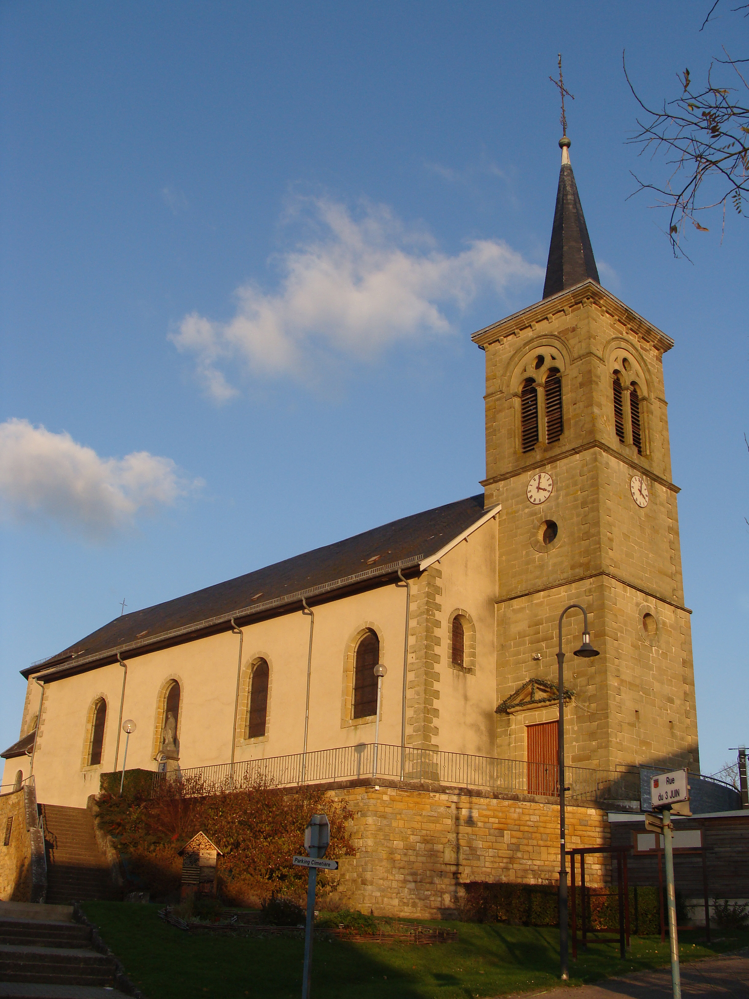 Église Saint Félix de Nole de Bambiderstroff (Moselle)